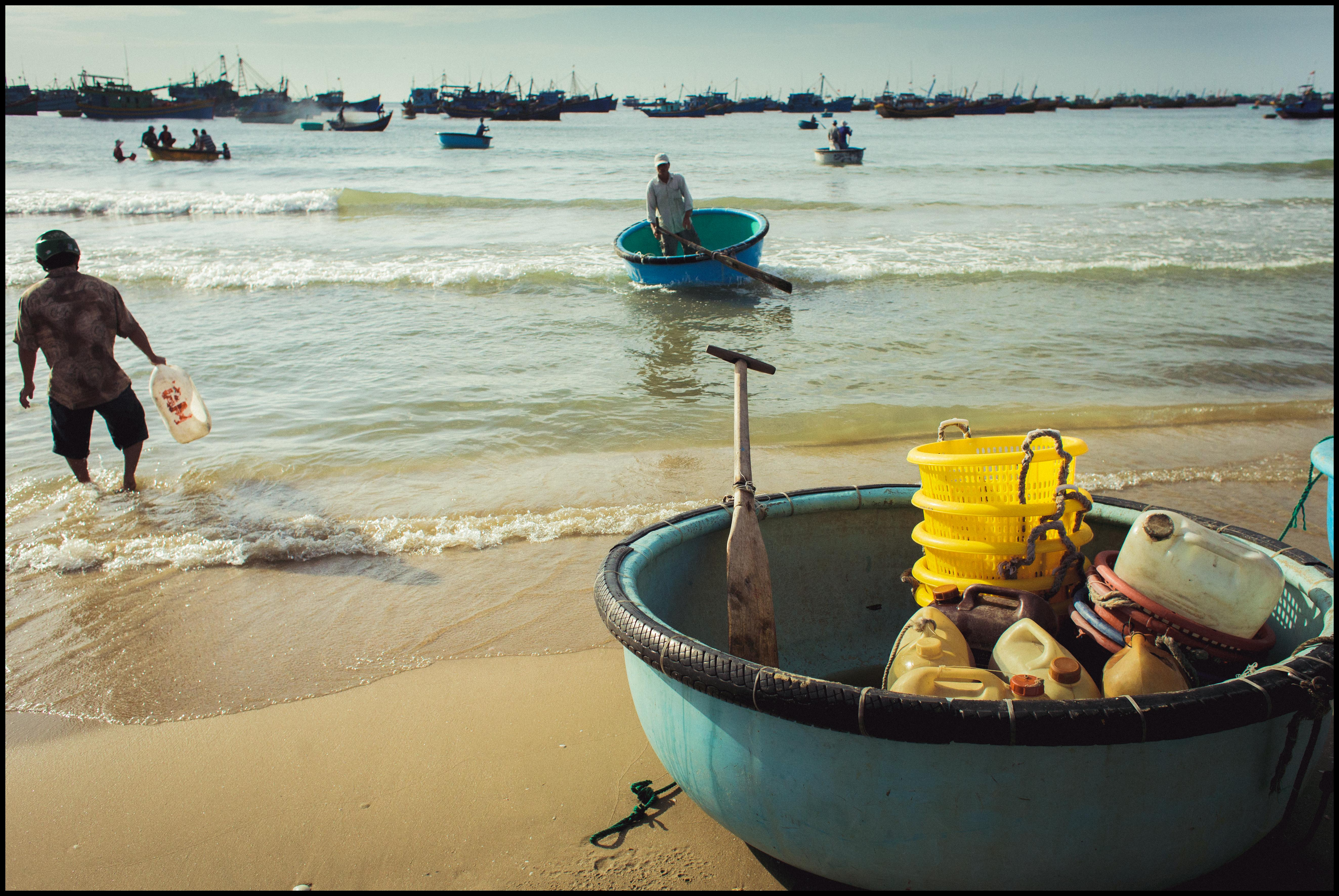 Mũi Né, Vietnam